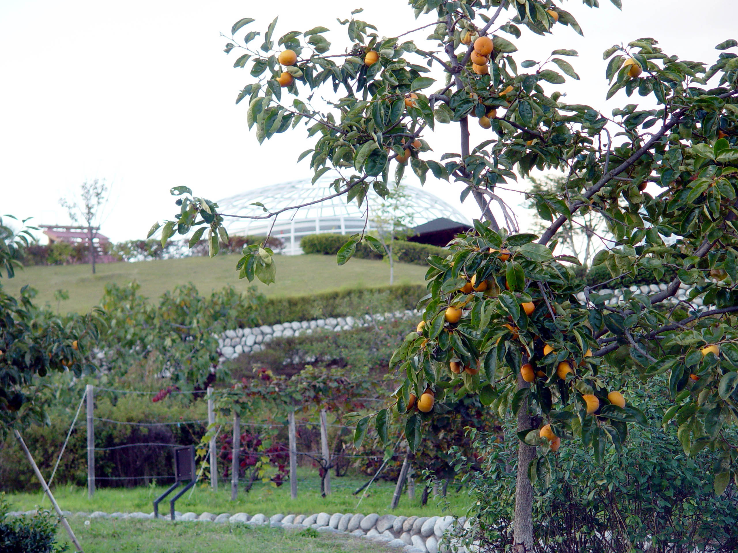 Fuefukigawa Fruits Park, Yamanashi, Yamanashi, Japan笛吹川フルーツ公園